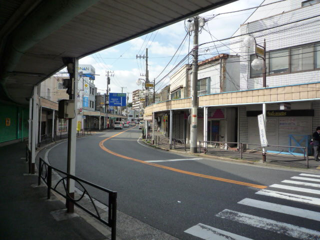 駅前商店街を撮影。